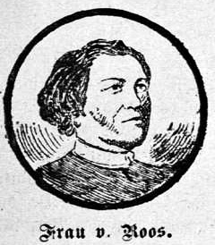 Karoline Roos geb. Alwens, Mordopfer, München, 1896